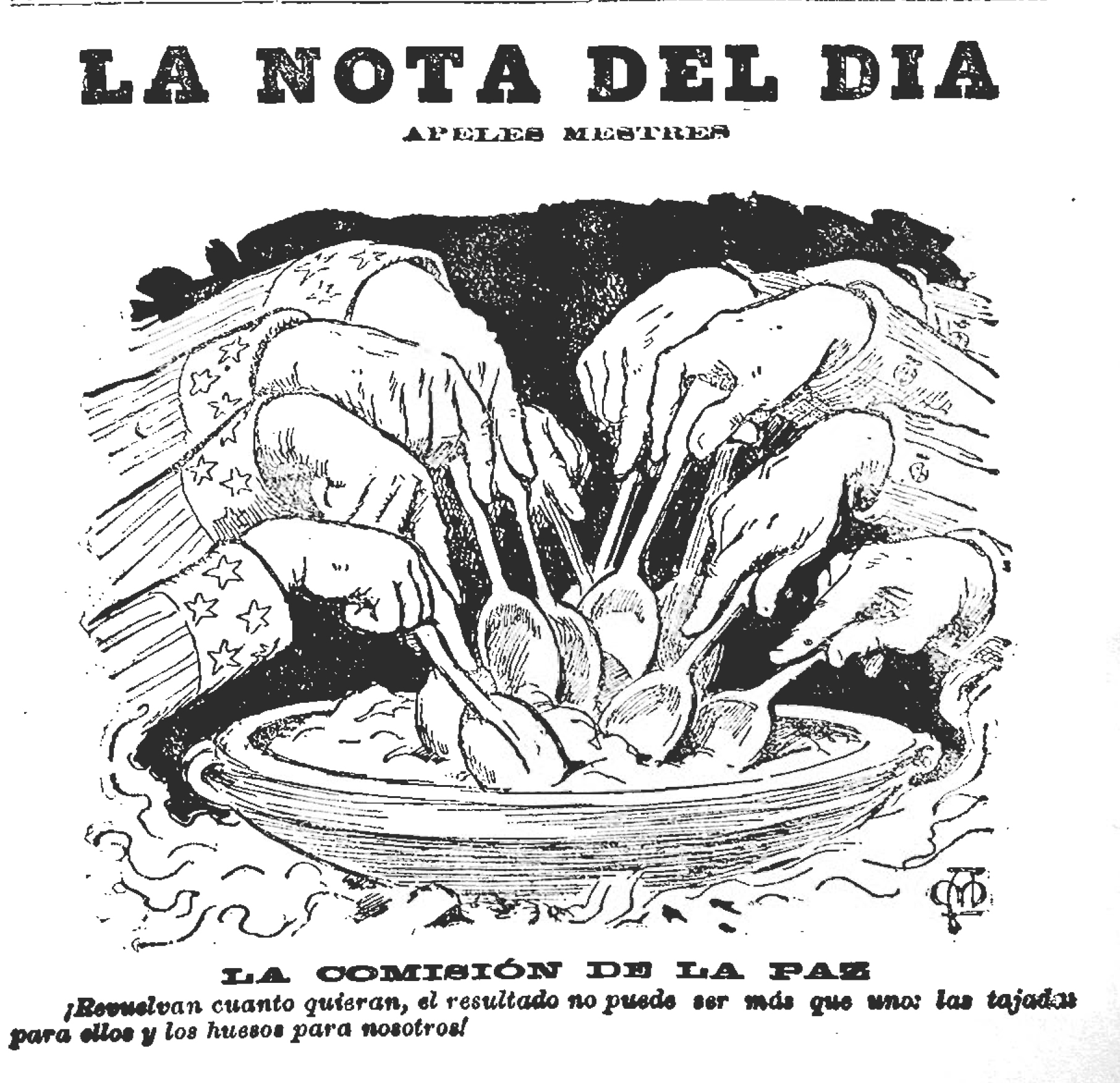 La nota del día. La comisión de la paz.